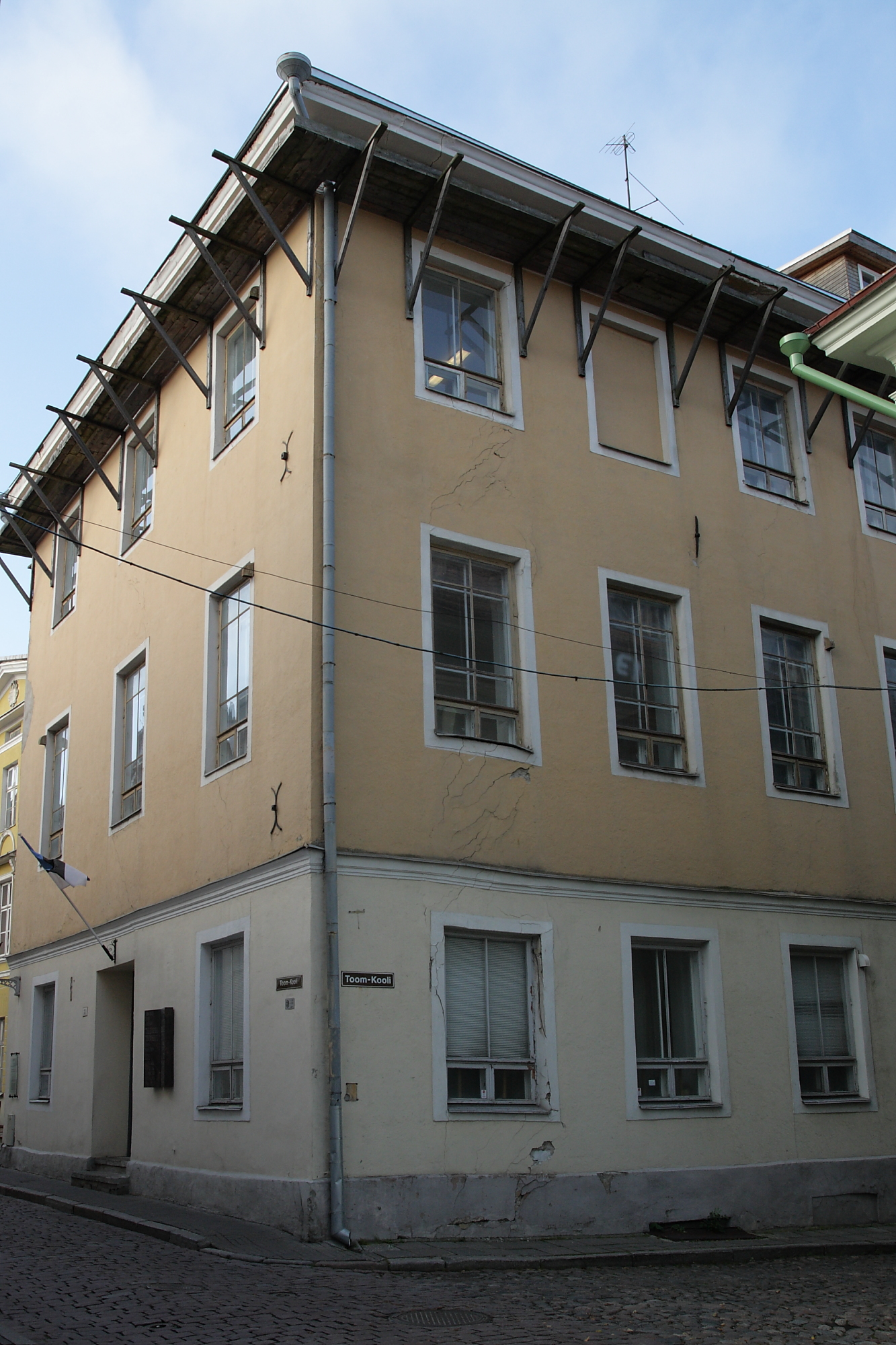 Tallinn, maja, kus aastatel 1845-1893 ja 1906-1939 asus Toomkool